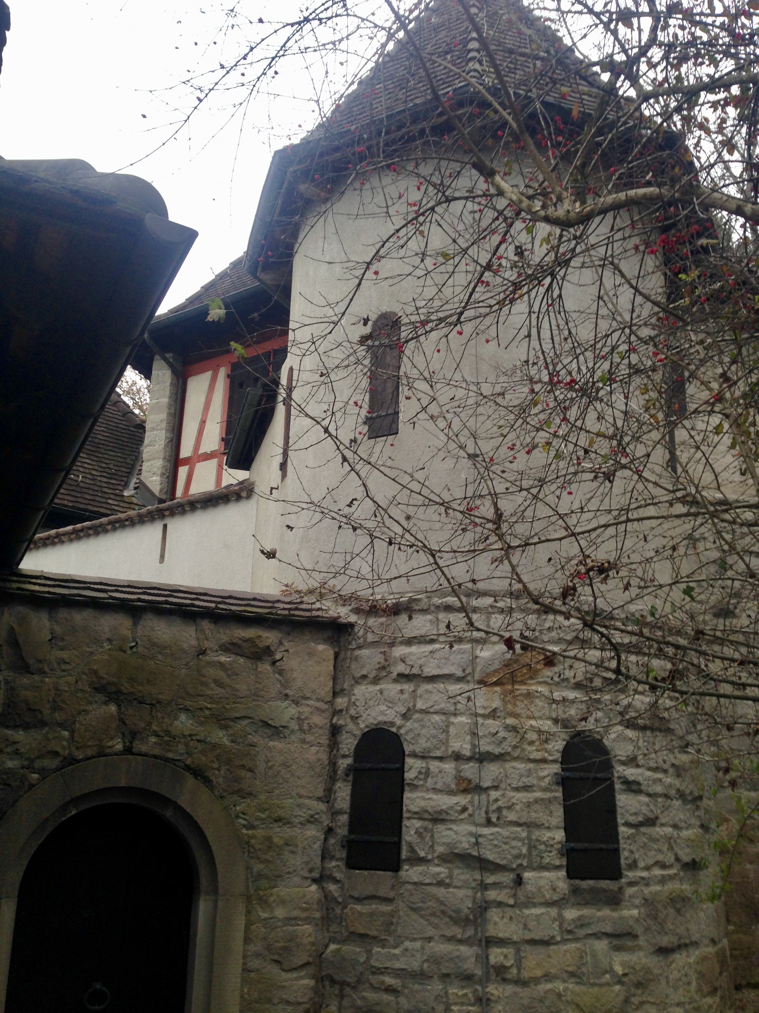 Bollingen Tower